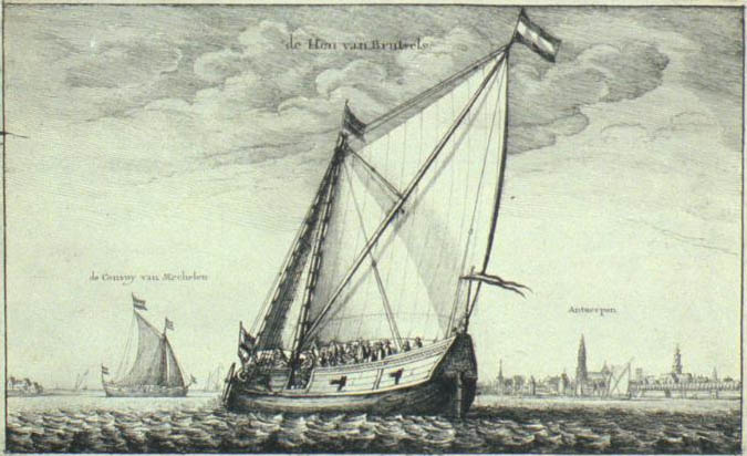 Enkele kleine kustvaartuigen, tjalken; de Heu van Brussel en de Convoy van Mechelen op de Schelde bij Antwerpen